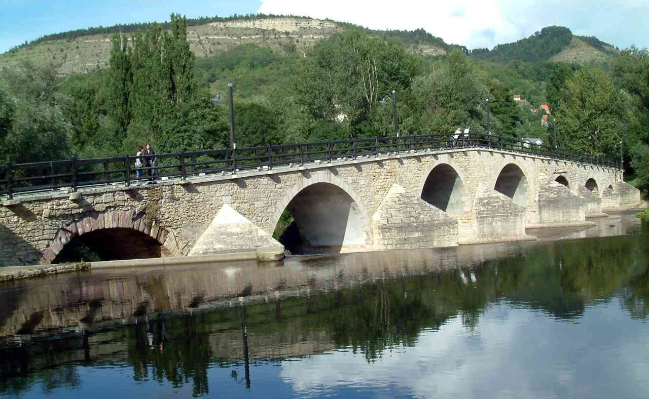 Alte Burgauer Brücke in Jena Burgau, im Hintergrund der Johannisberg